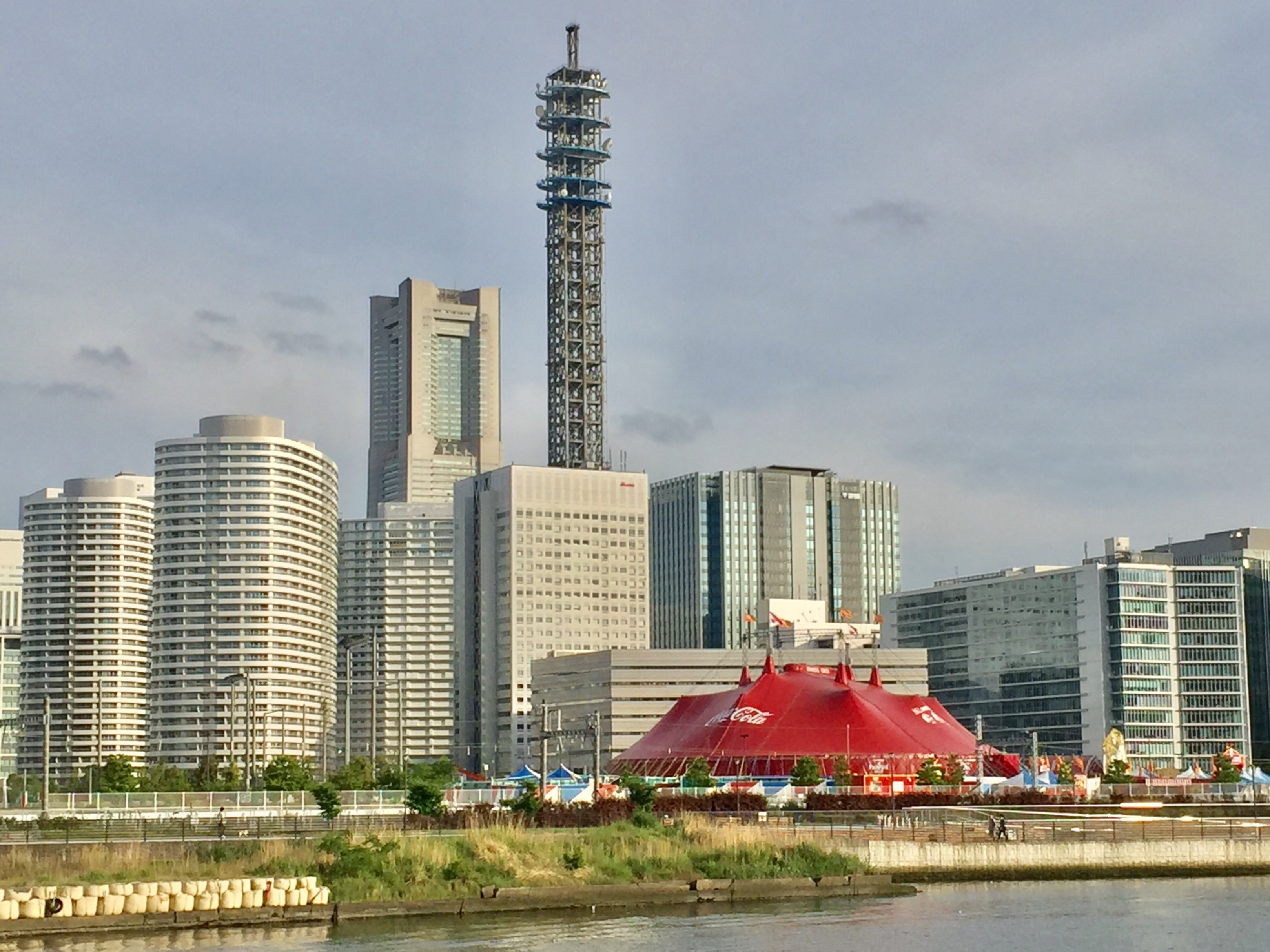 横浜みなとみらい地区で2017年に開催された木下大サーカス。みなとみらいのビル群とサーカスのテント。